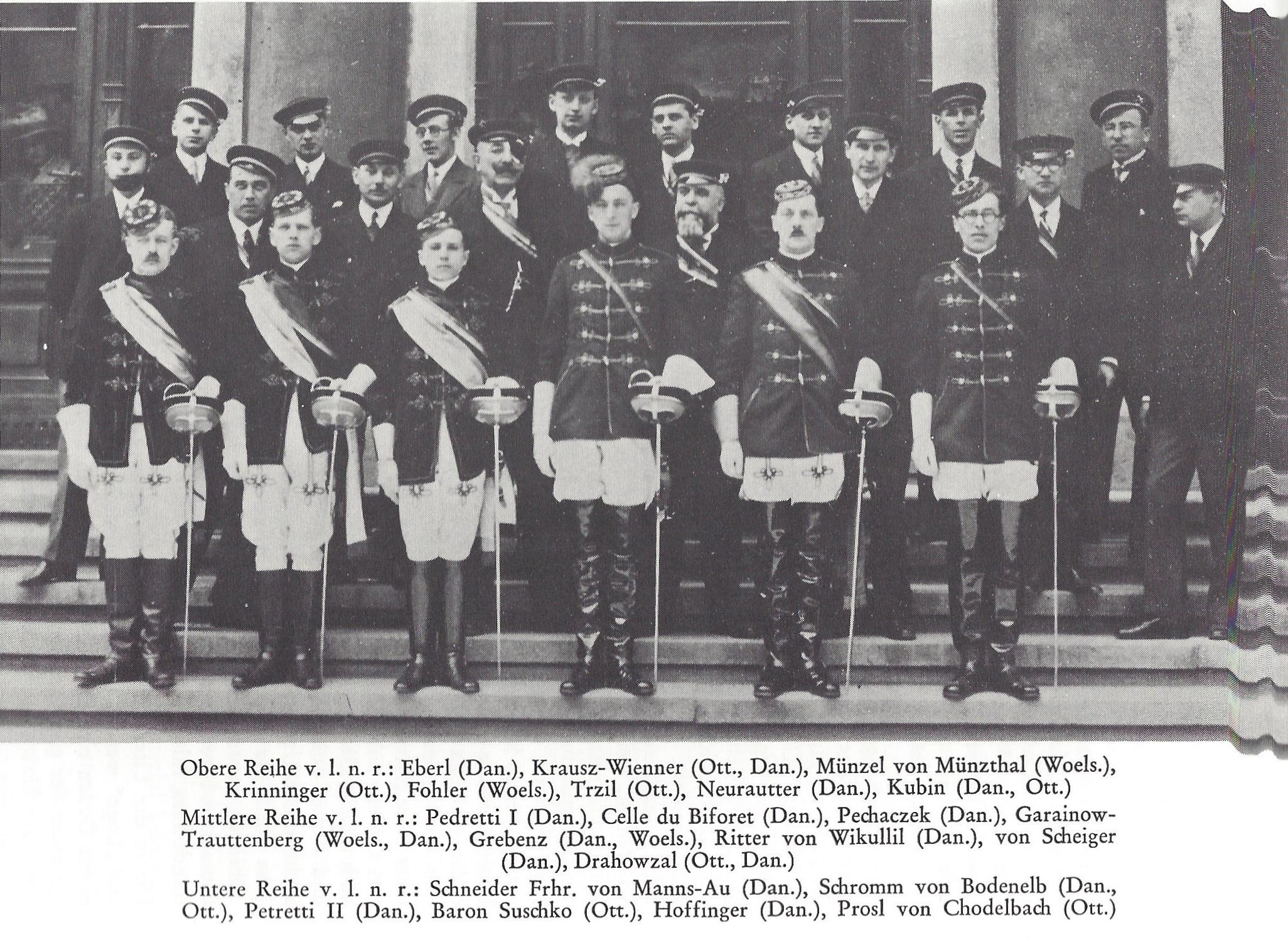 Fotografie vom 10. Stitungsfest des Corps Danubia zu Graz im Mai 1931